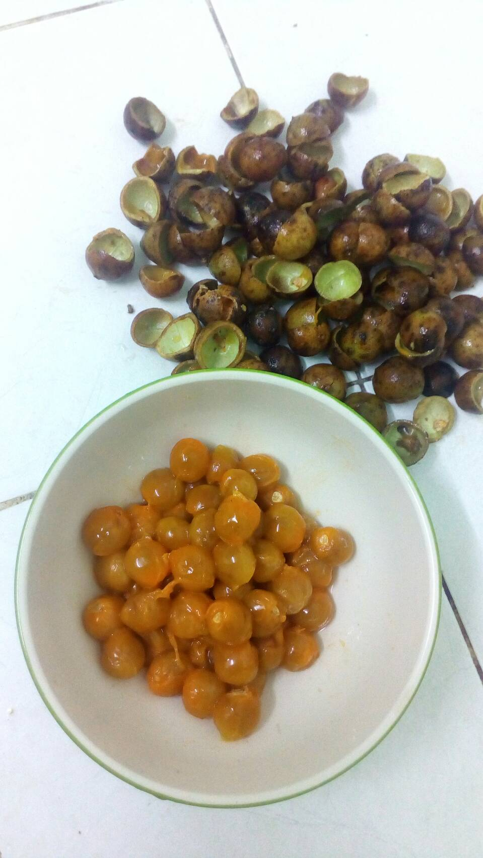 Фрукти Schleichera ลูกค้อ